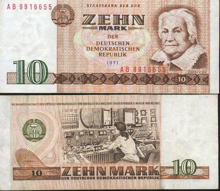 10 Mark der DDR (Vorder- und Rückseite)